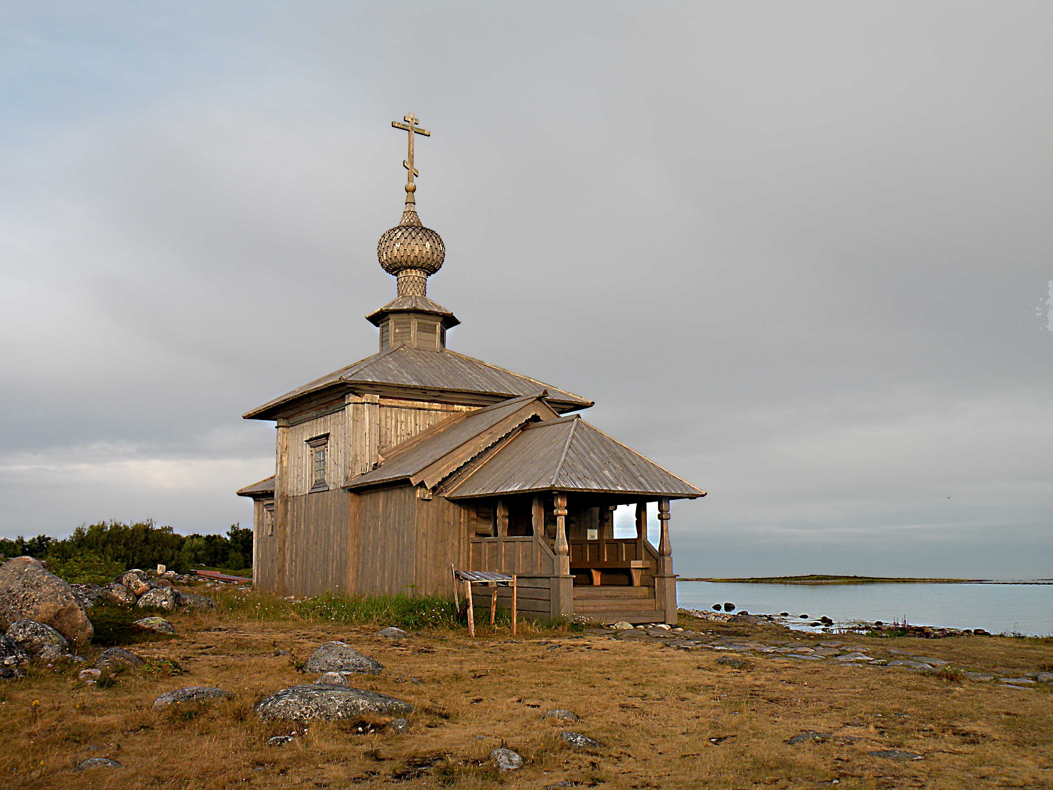 Часовня Андрея Первозванного. Сооружение было по указанию Петра перевезено из другого места и заново собрано в 1702 году . К зданию был прирублен алтарь.После этого два корабля были по-суху перевезены в Онежское озеро и участвовали в отвоевании устья Невы.